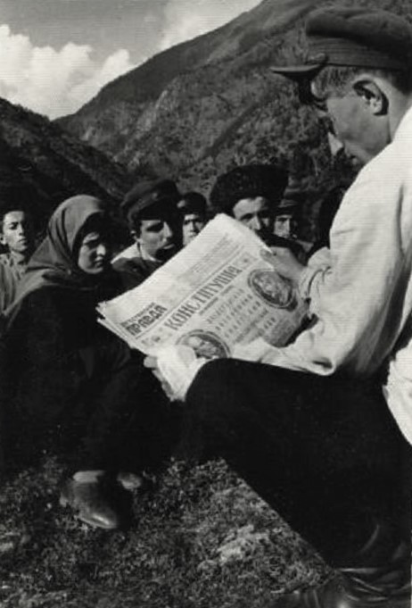 Дагестан. В горном ауле изучают проект новой Конституции